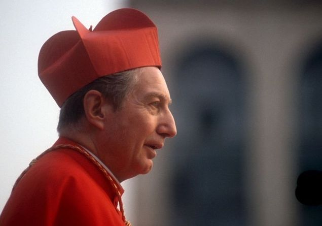 Jesuita